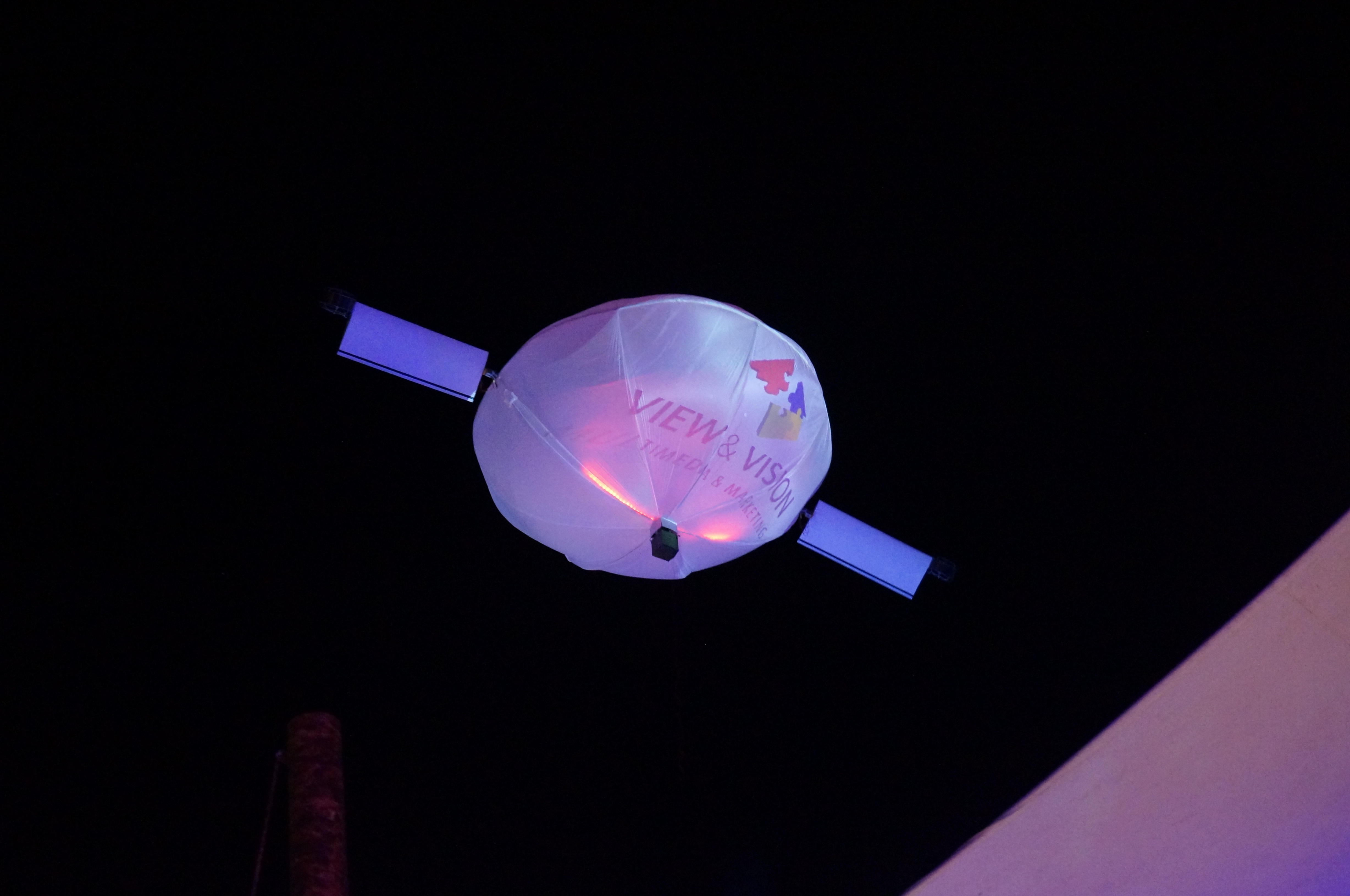 Prototyp H-Aero One beim Flug auf der Kurru Kurru Fashion Show am 03.08.2016 im Pau Brasil Ibiza, Carrer del Pedrer 4, Polígono Ca na Palava, 07819 Santa Eulalia, Islas Baleares.